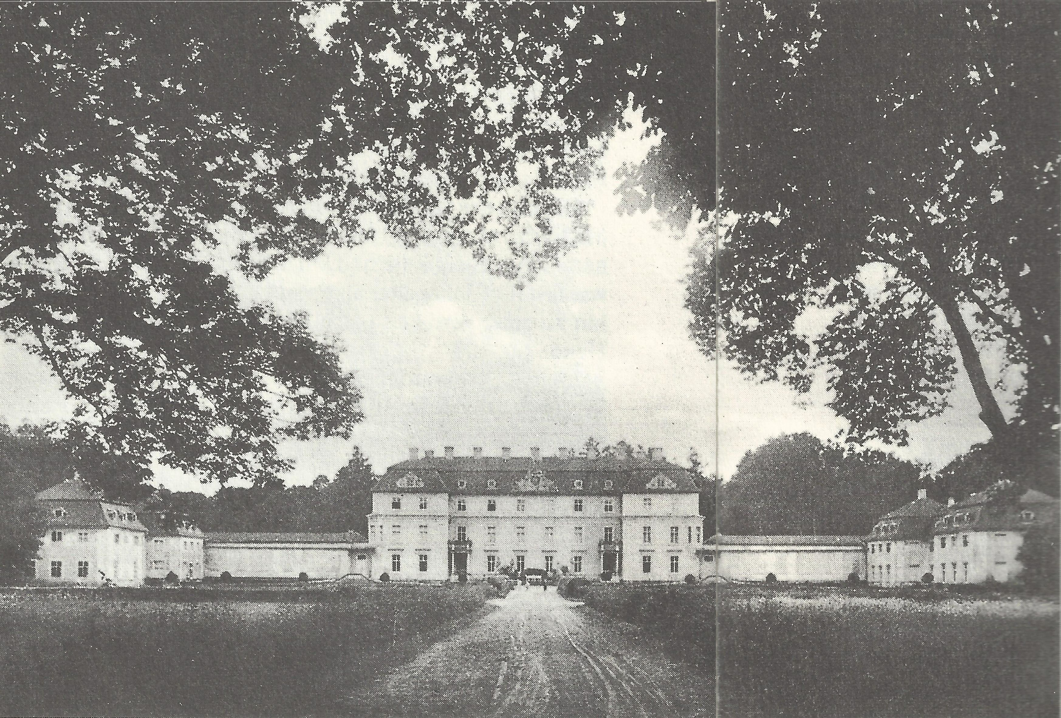 Schloss Schlobitten, etwa 1915. Erbaut 1625 unter Abraham Burggraf zu Dohna als Renaissanceschloss, der Umbau zum Barockschoss wurde unter Alexander zu Dohna 1713 vollendet. Niedergebrannt 1945.